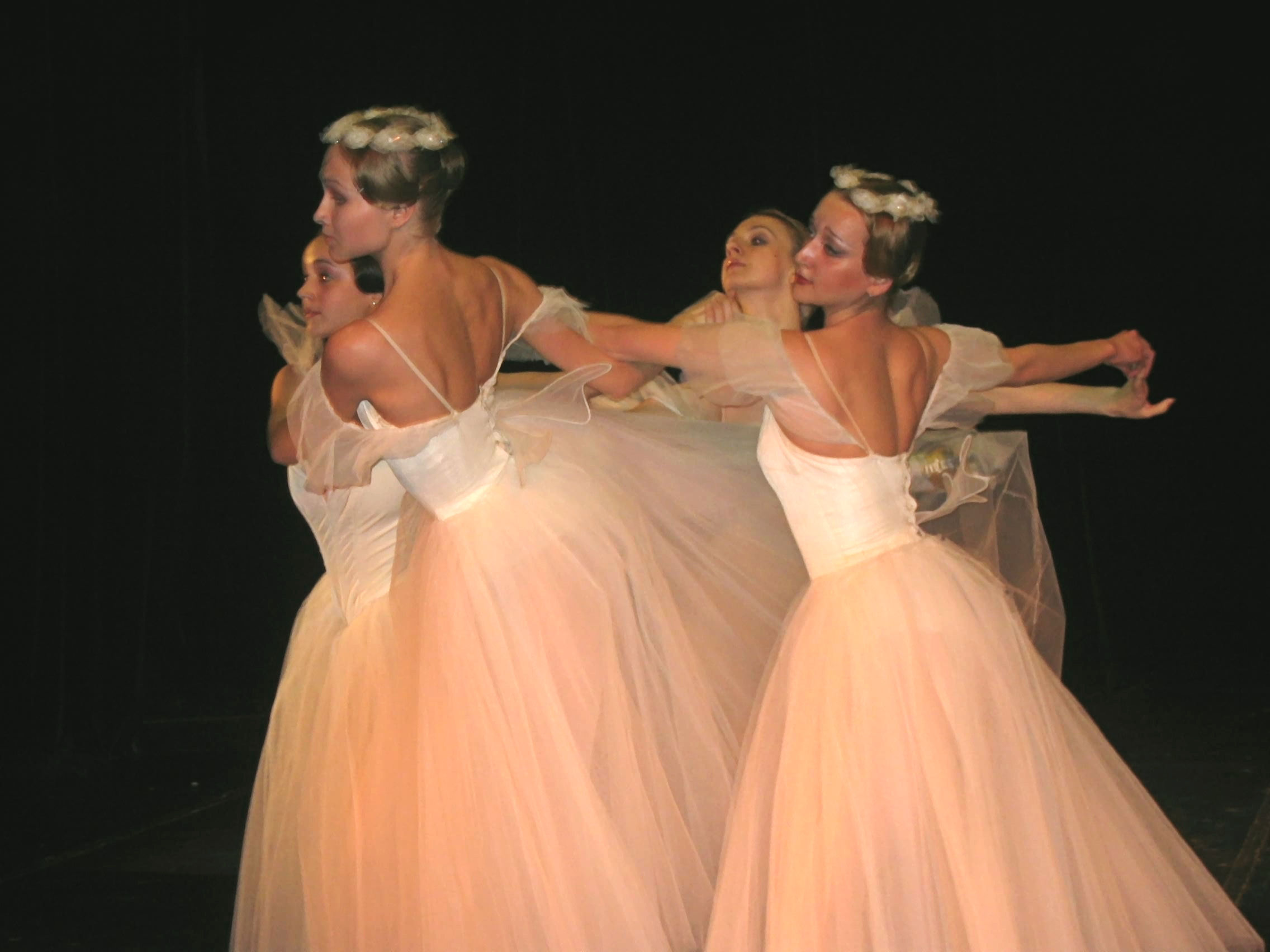 Ballerina's in St. Petersburg. Toestemming fotograaf. GerardM 4 apr 2004 22:05 (CEST) Ik heb deze foto van mijn zus gekregen ..